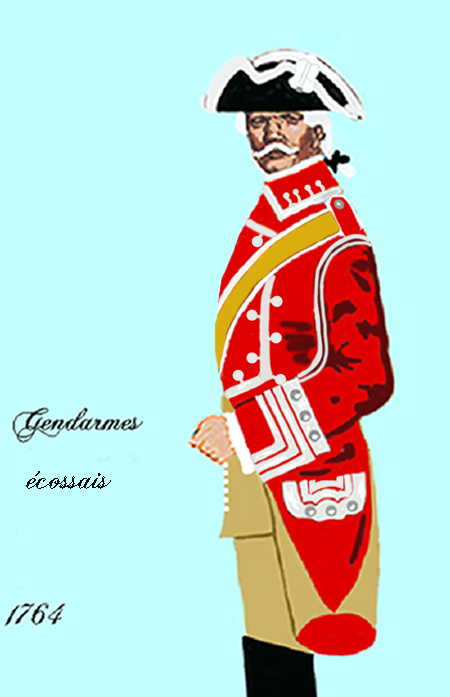 1. Kompanie der Gendarmes de France (Gendarmes écossais) 1764